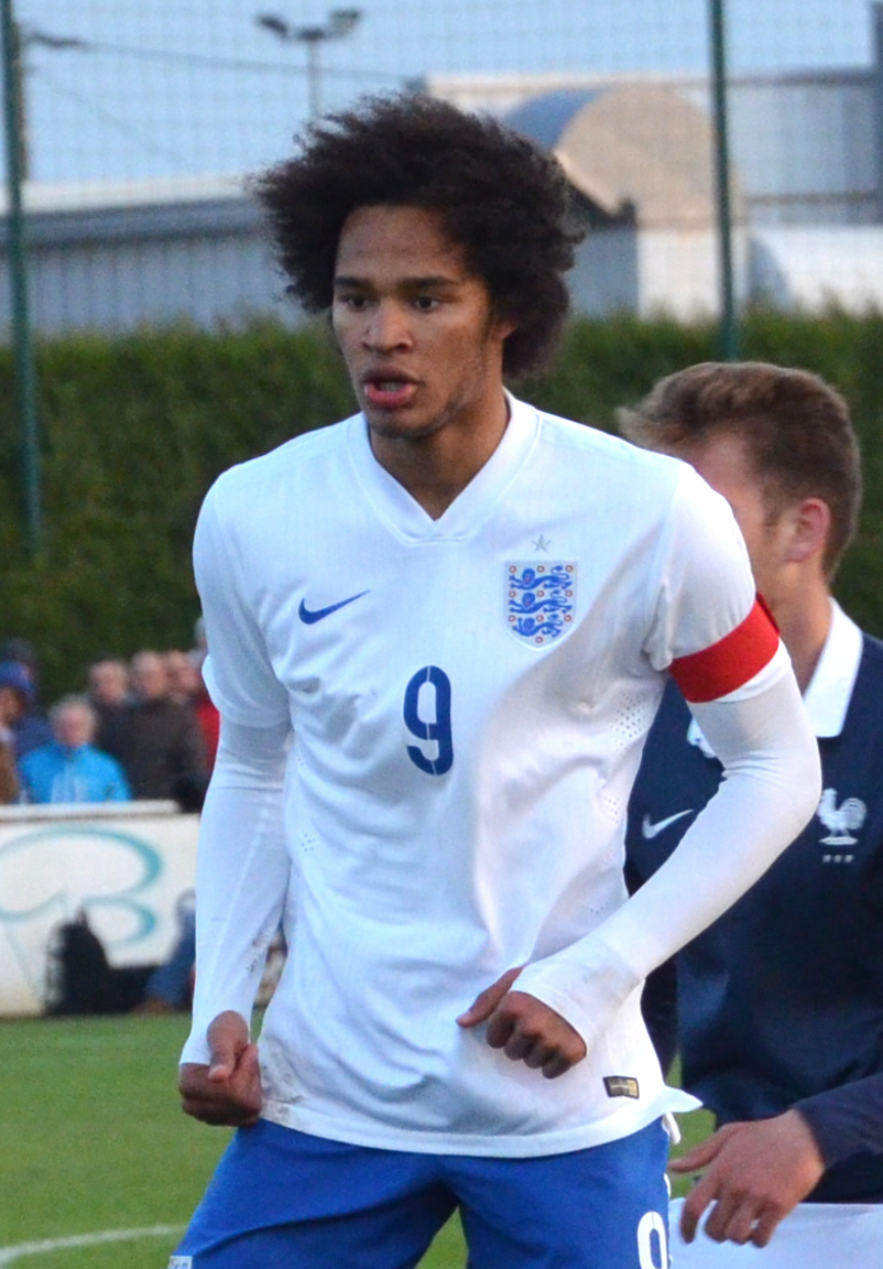 Photographie prise lors du match opposant la France à l'Angleterre pour les qualifications du championnat d'Europe de football des moins de 19 ans 2015 au stade Louis-Villemer de Saint-Lô le 31 mars 2015. Ici, Isaiah Brown.